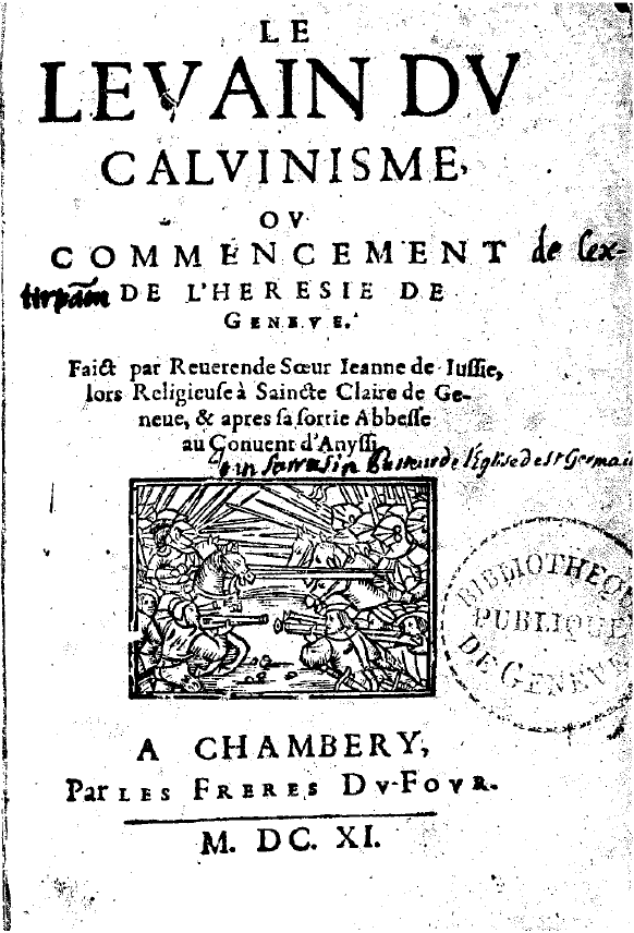 Le levain du calvinisme ... de Jeanne de Jussie (1503-1561). Éditions de 1611 par J.-G. Fick (Genève).